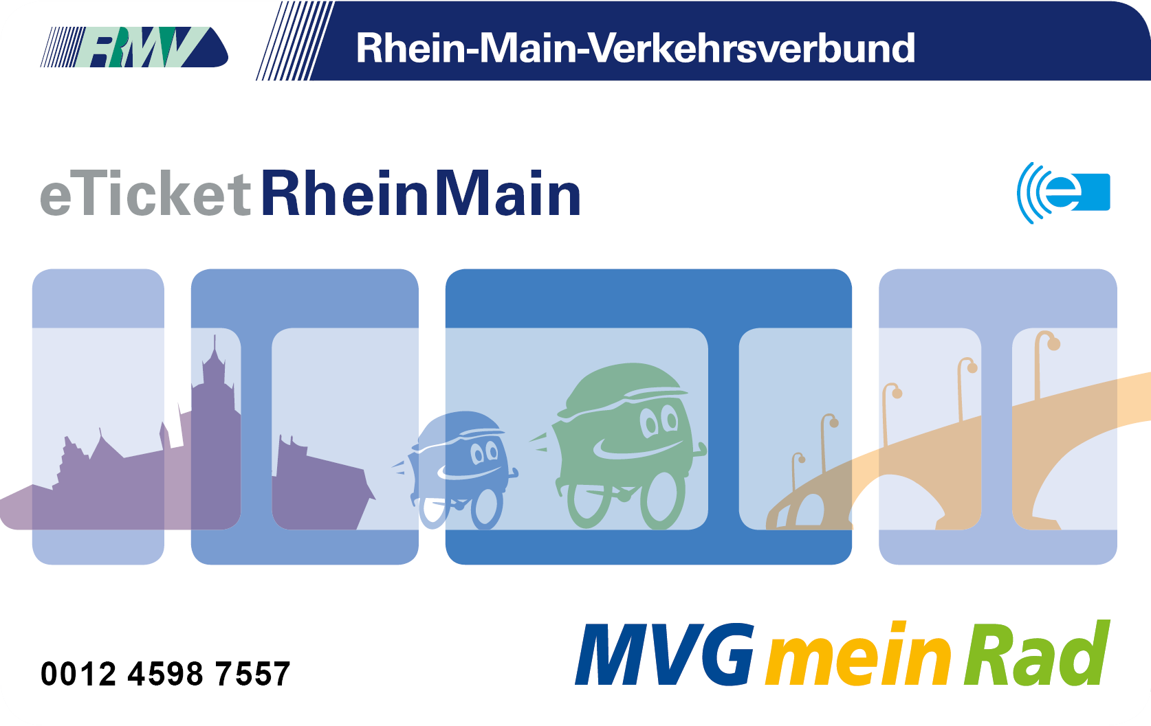 eTicket RheinMain mit Mainz-spezifischen Aufdruck